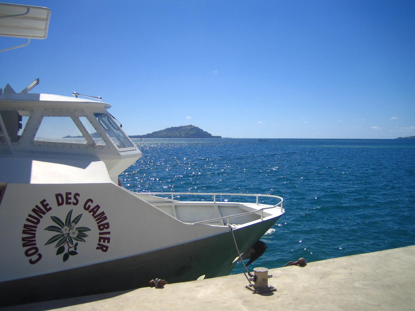 Fähre der Gemeinde Gambier in Rikitea auf Mangareva